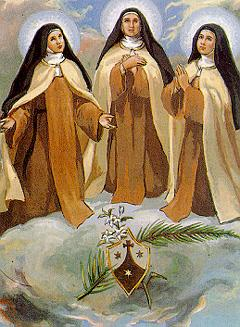 Гвадалахарские мученицы. Автор неизвестен.